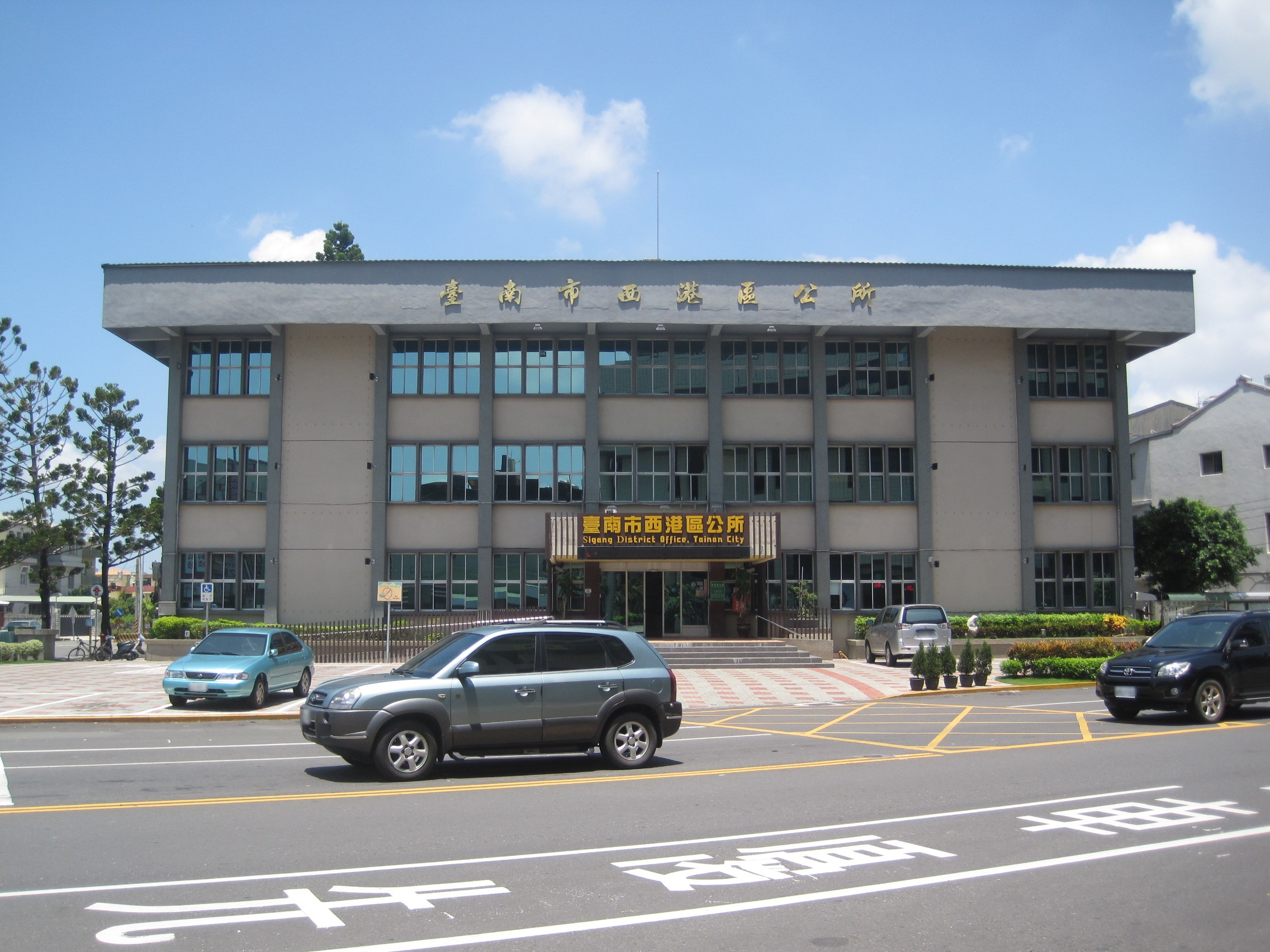 2016年的西港區公所